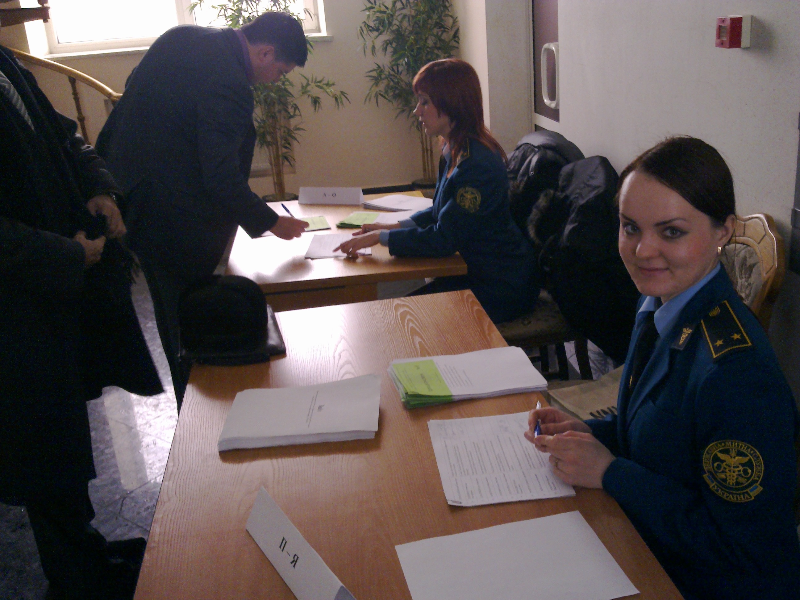 Реєстрація на засідання громадської ради при Державній митній службі України